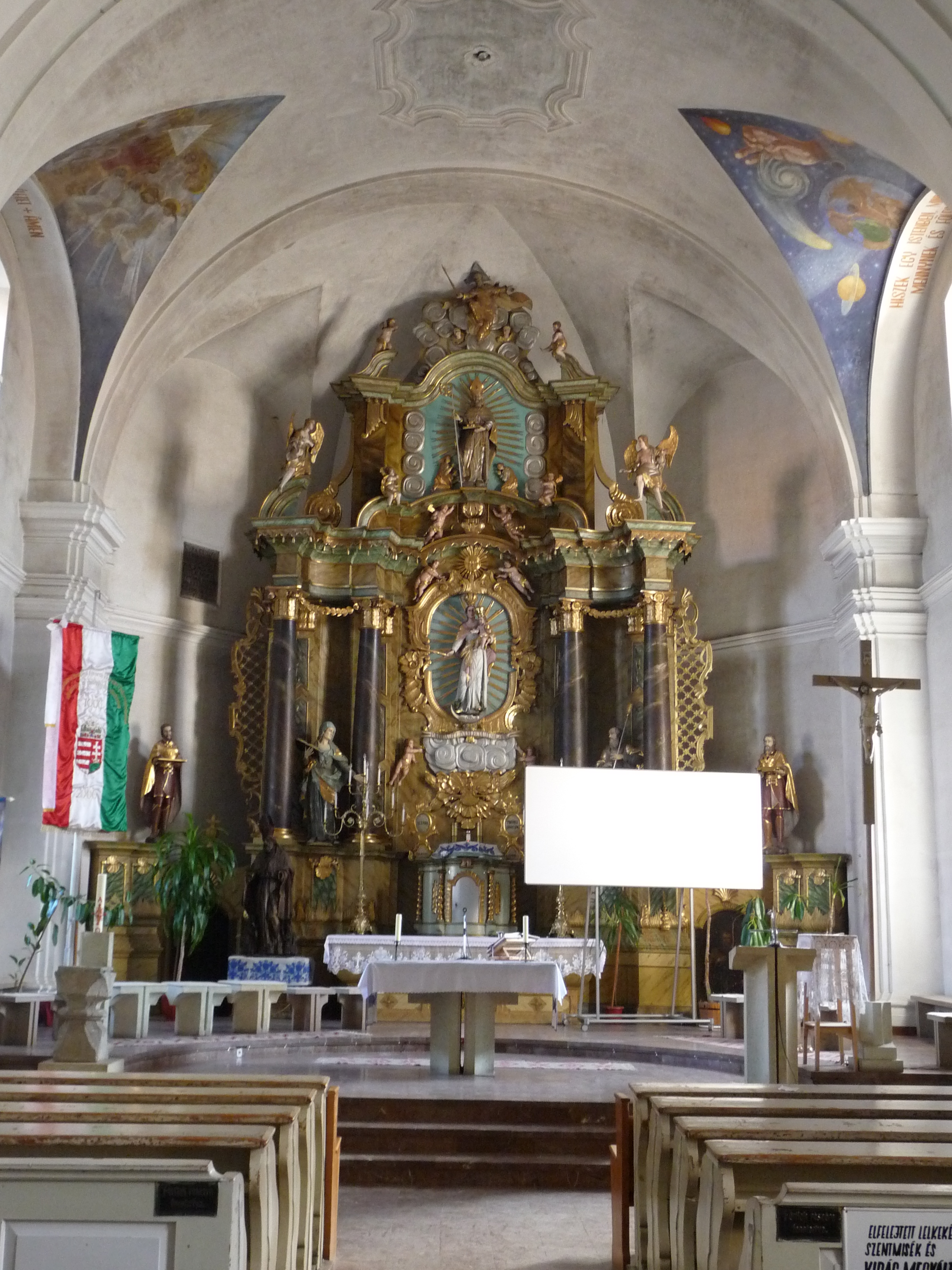 Gyergyószentmiklós, a római katolikus templom főoltára